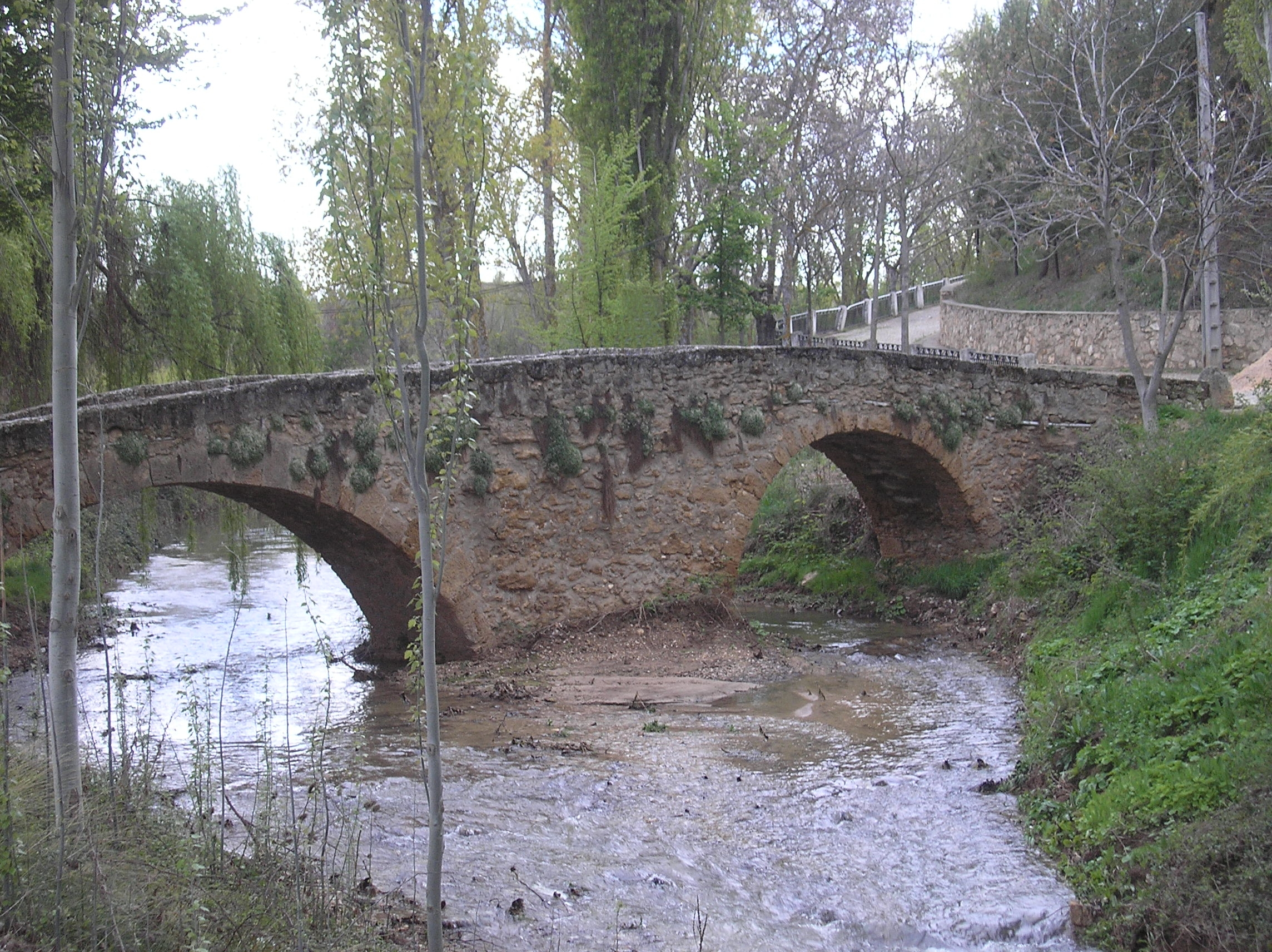 Puente de El Nogueral sobre el río Trabaque